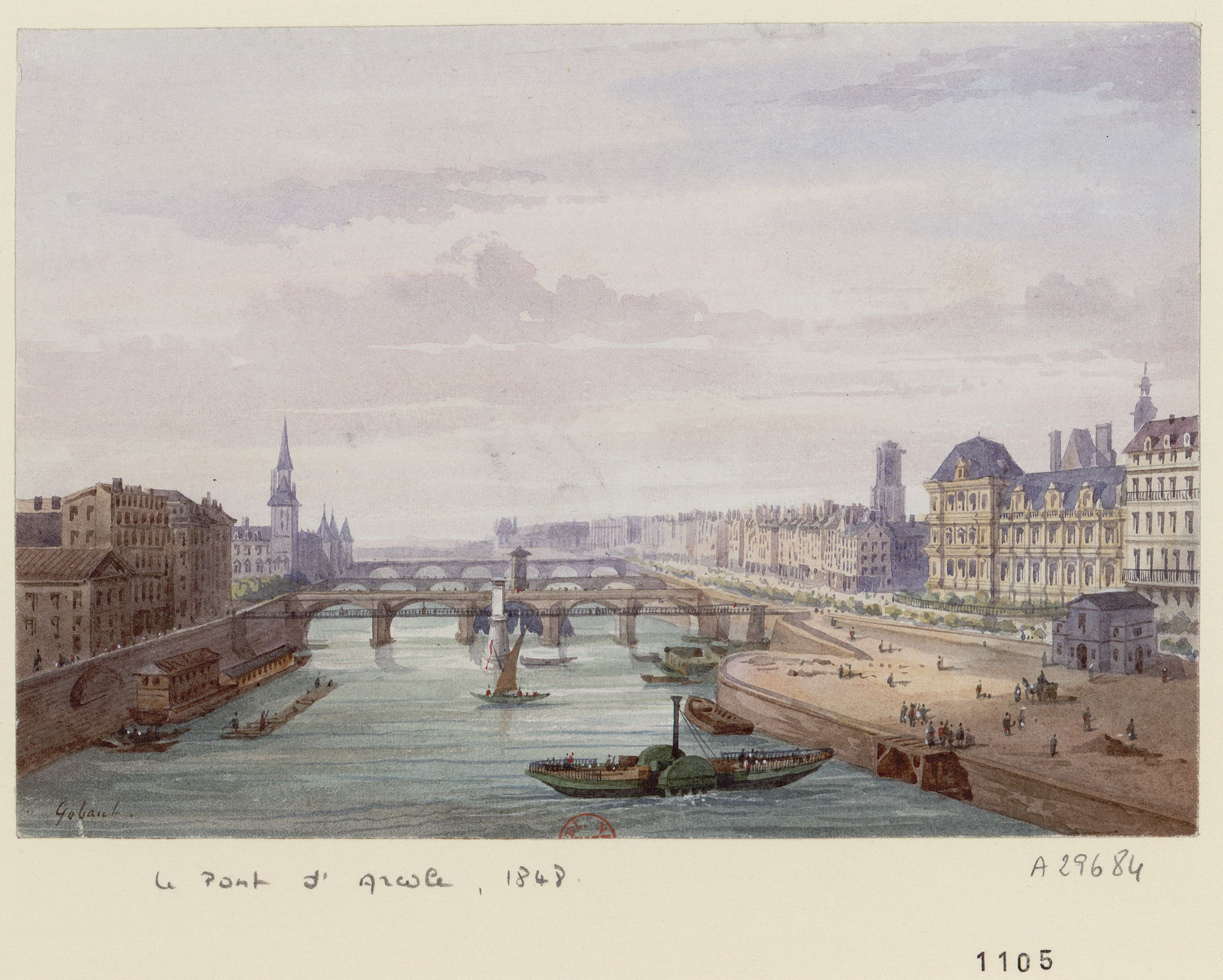 Paris - Pont d'Arcole, par Gaspard Gobaut (1814-1882). Aquarelle et rehauts de gouache 12,5 x 18,2 cm, en provenance de la collection Hippolyte Destailleur.